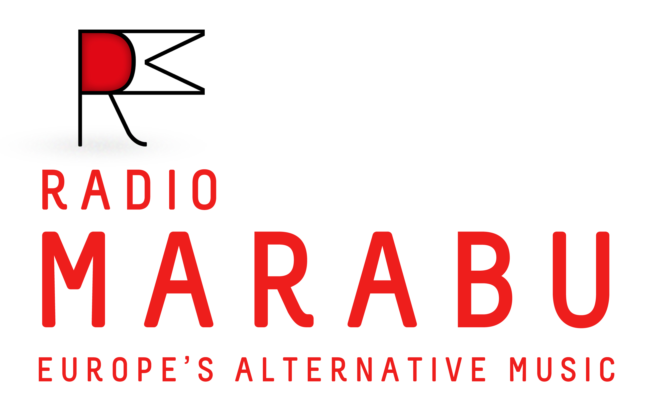 RADIO MARABU